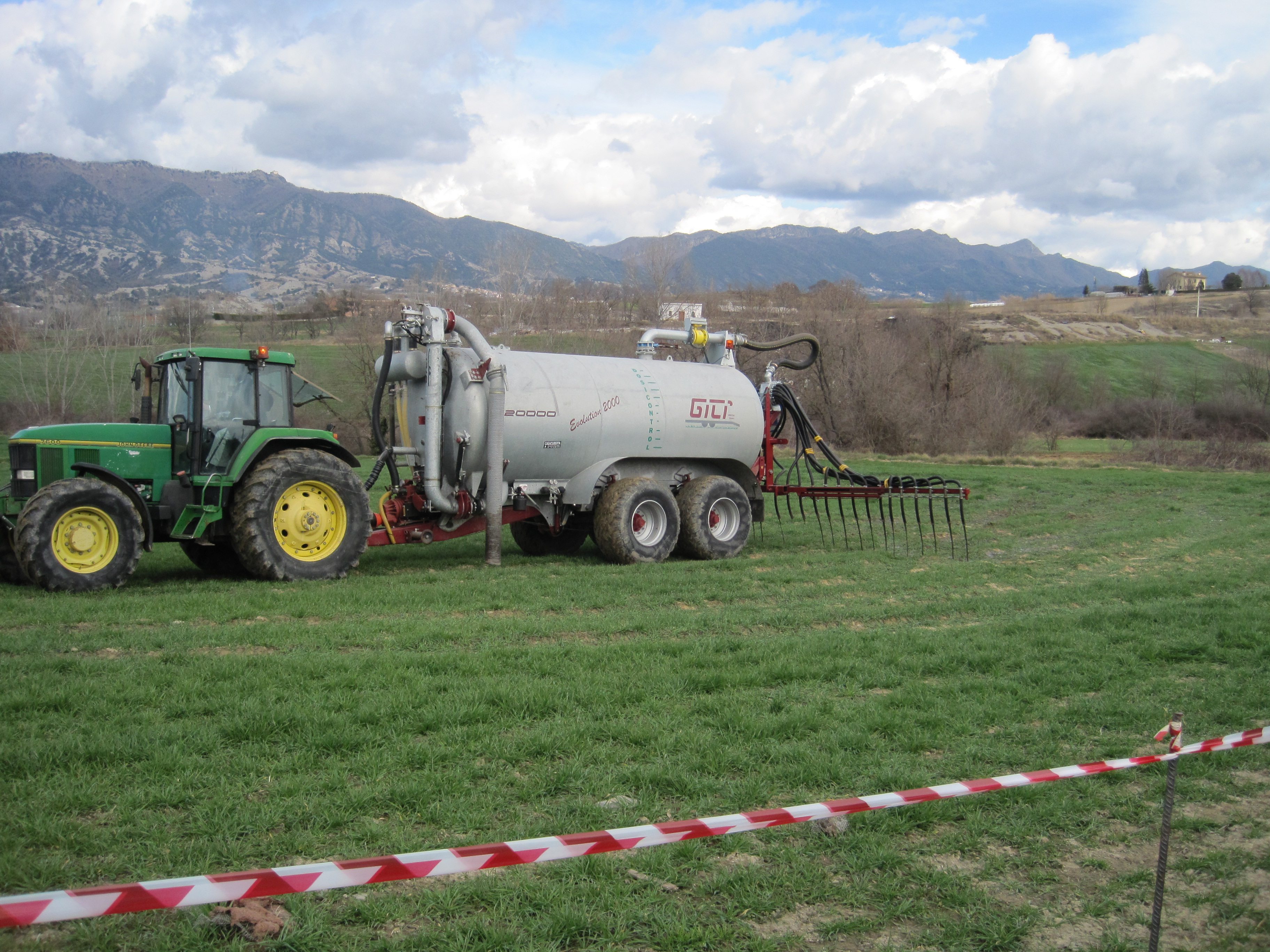 Maquina aplicant Purins